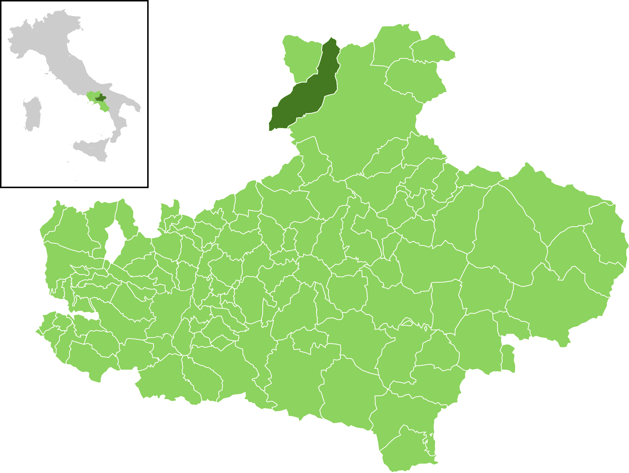 Posizione del comune all'interno della provincia di Avellino